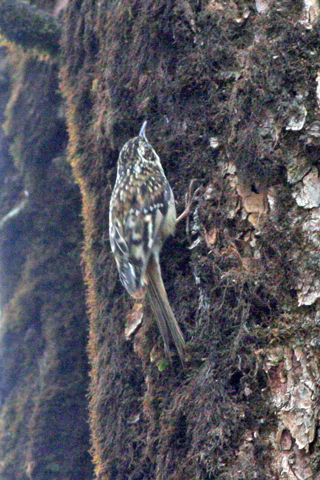 Wawu Shan, Sichuan